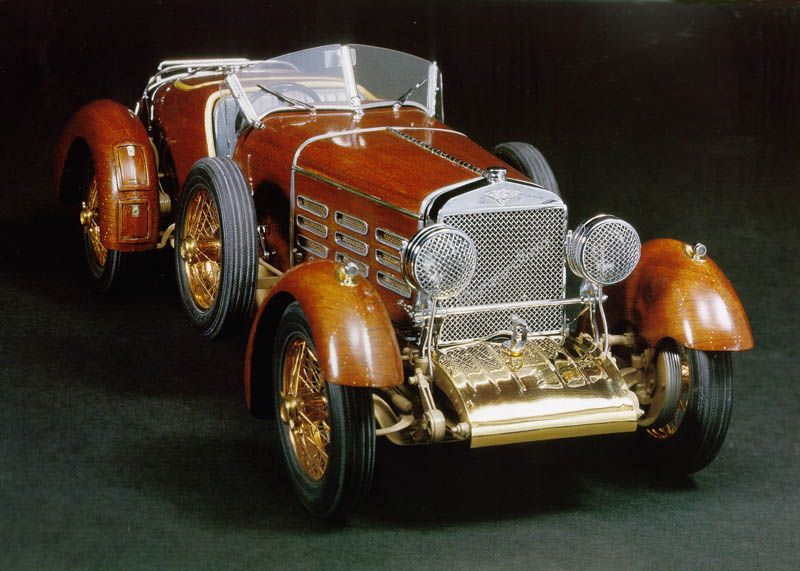 Hispano-Suiza H6C chasis largo